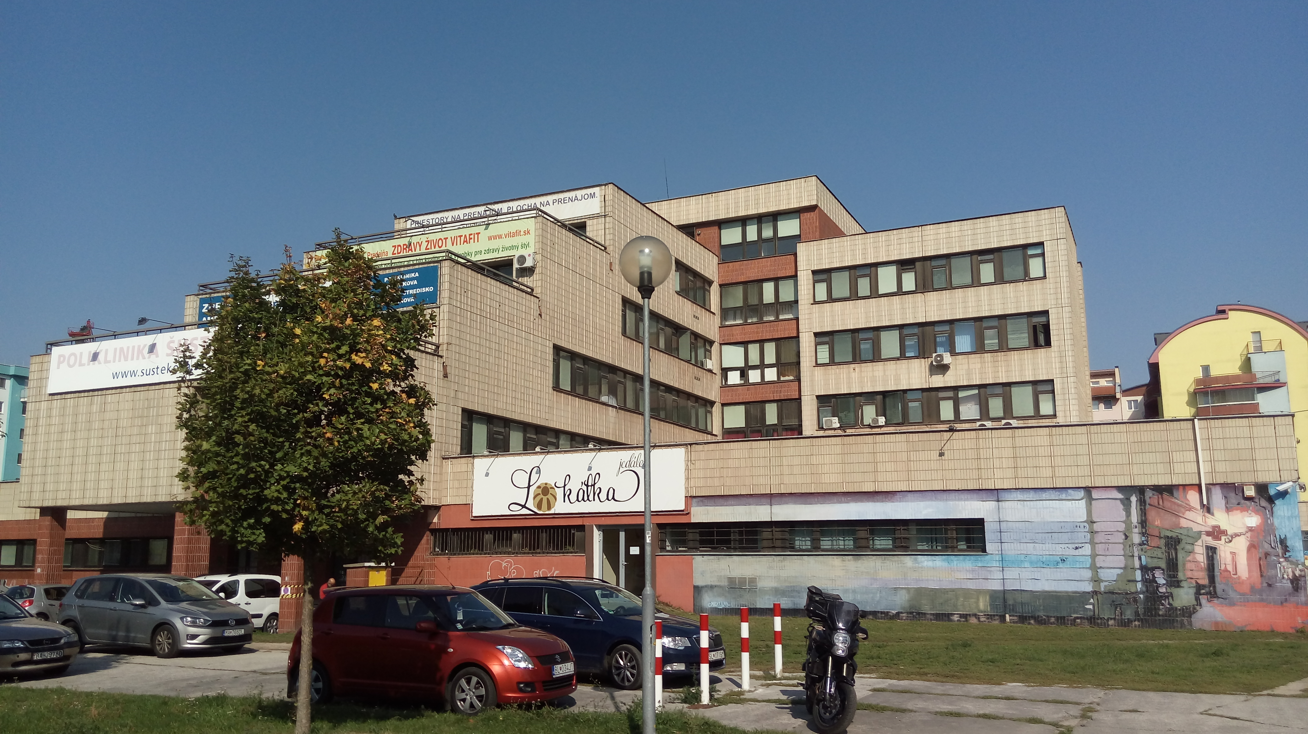 Šustekova 2, Petržalka, Bratislava